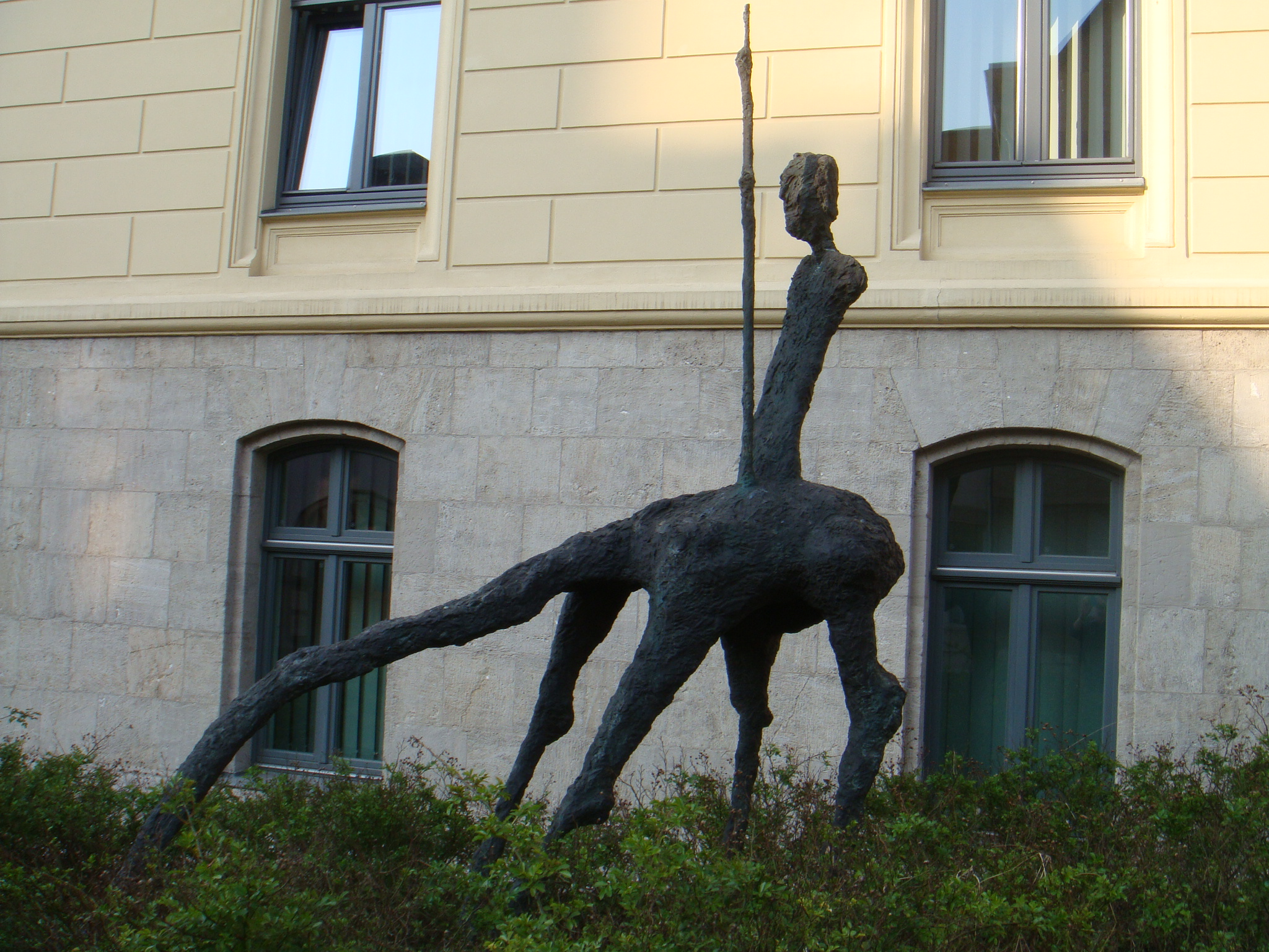 Bronzeplastik